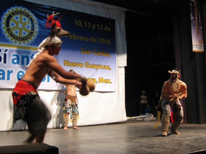 Presentación de la danza del venado en San Carlos, Sonora, México.